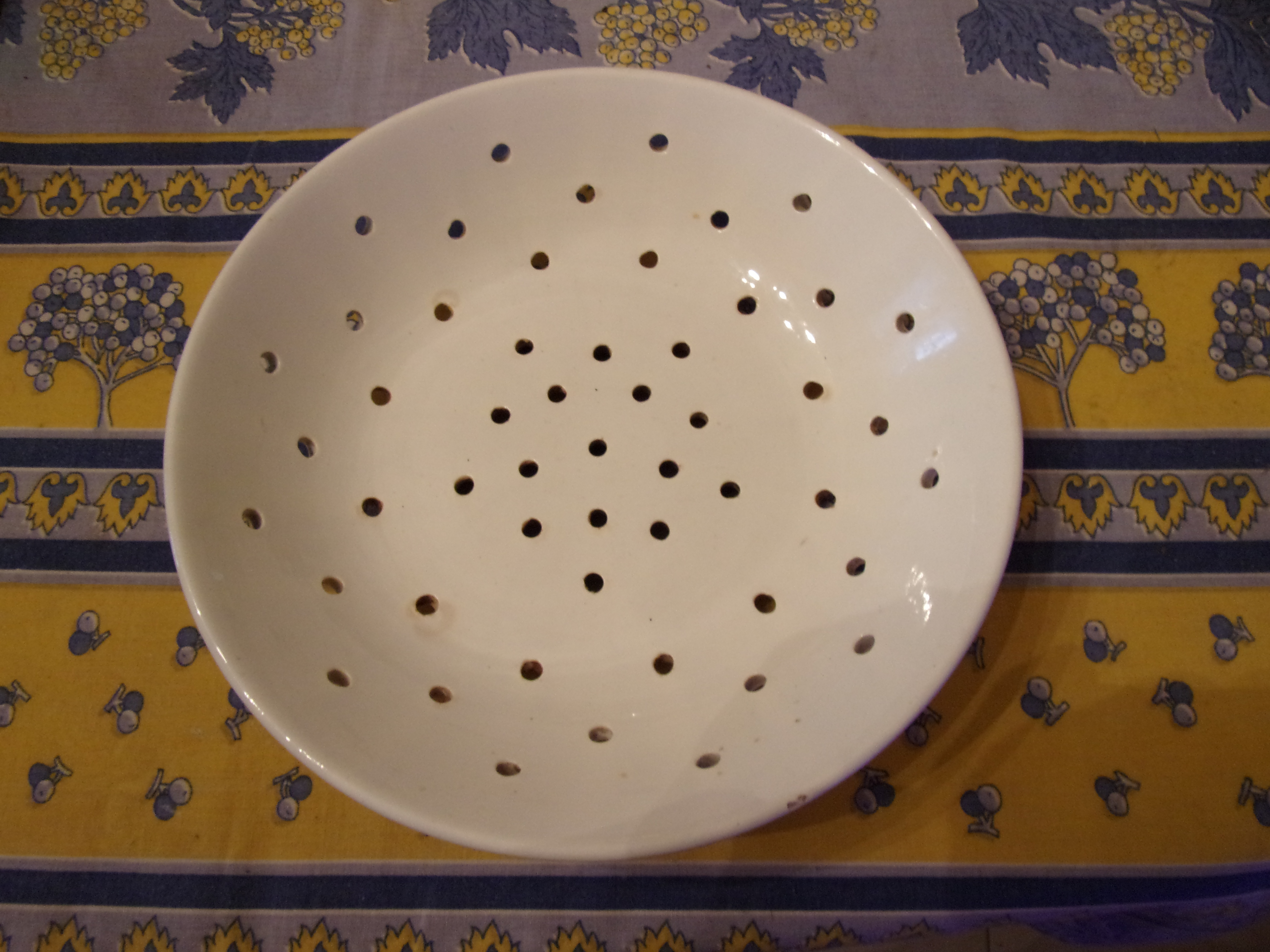 égouttoir à fruits en faïence de Digoin